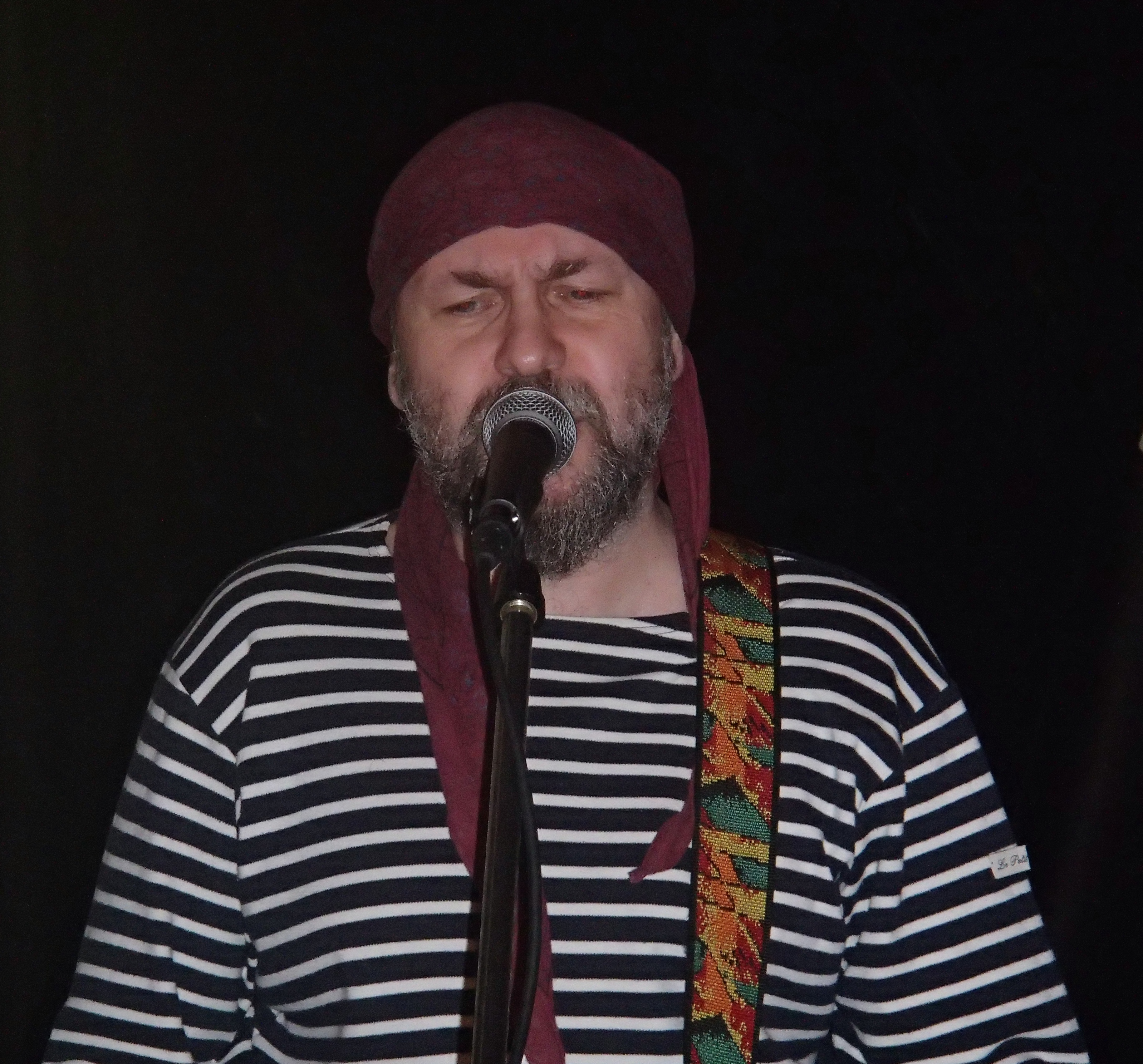 Jaromír František Palme na koncertě kapely Původní Bureš